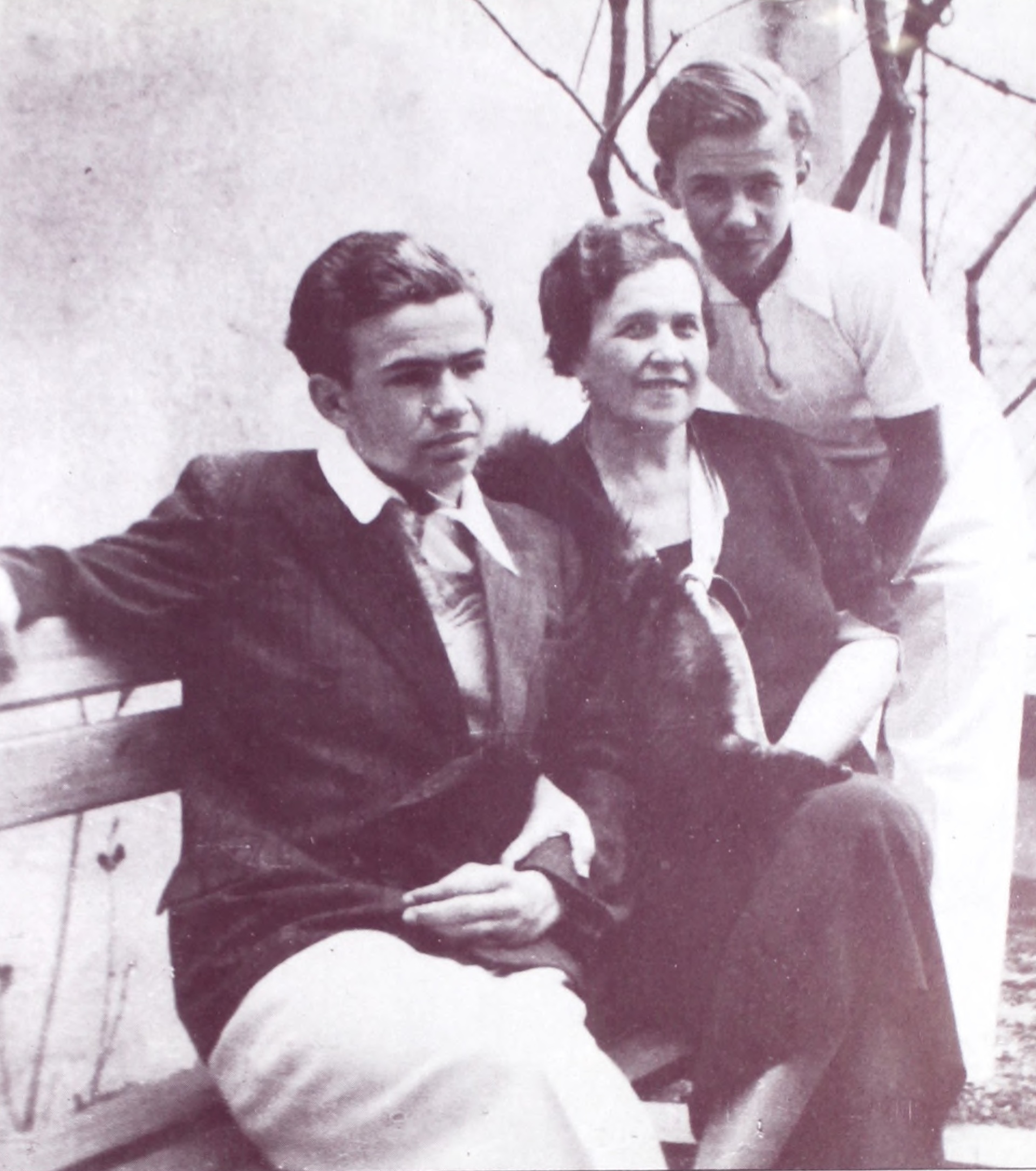 Браћа Рибар - Иво Лола и Јурица са мајком Тоницом Рибар у Београду, око 1935. године